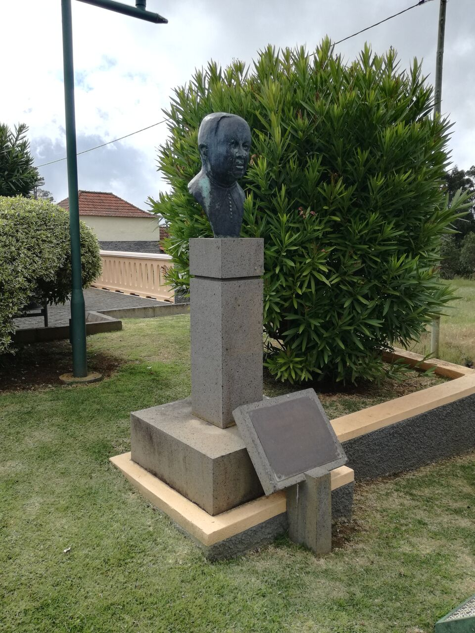 Foto do jardim do local onde a estátua está localizada